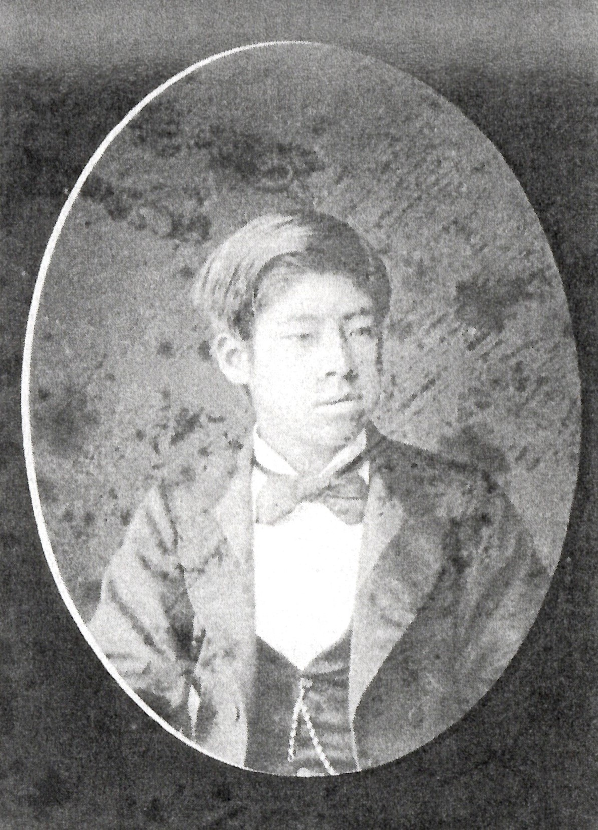 徳大寺公弘の肖像写真。